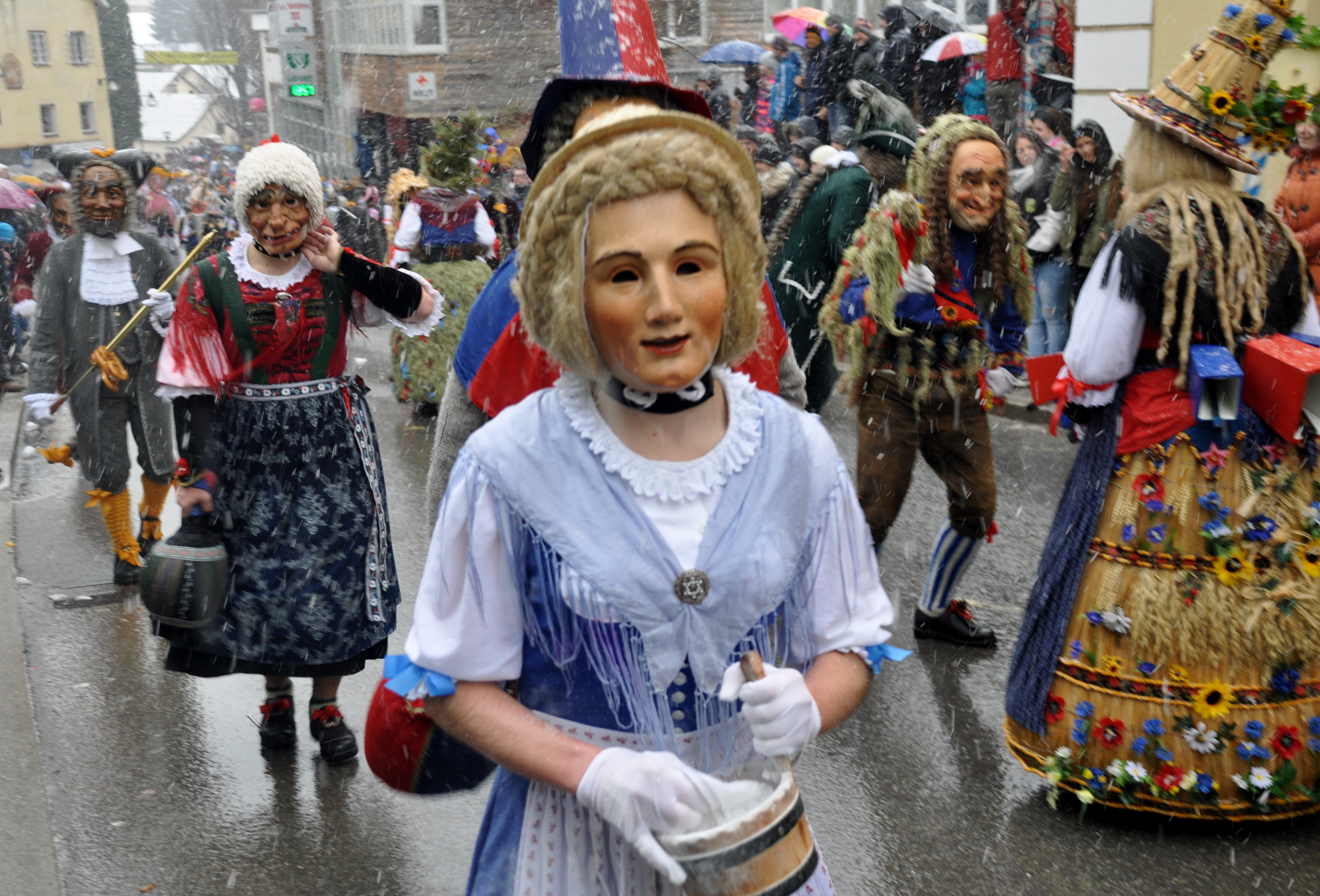 Imst (Tirol), Imster Schemenlaufen 2016, Kübelemaje, Wilfligsackner, Lagge (Laggeroller und Laggescheller)